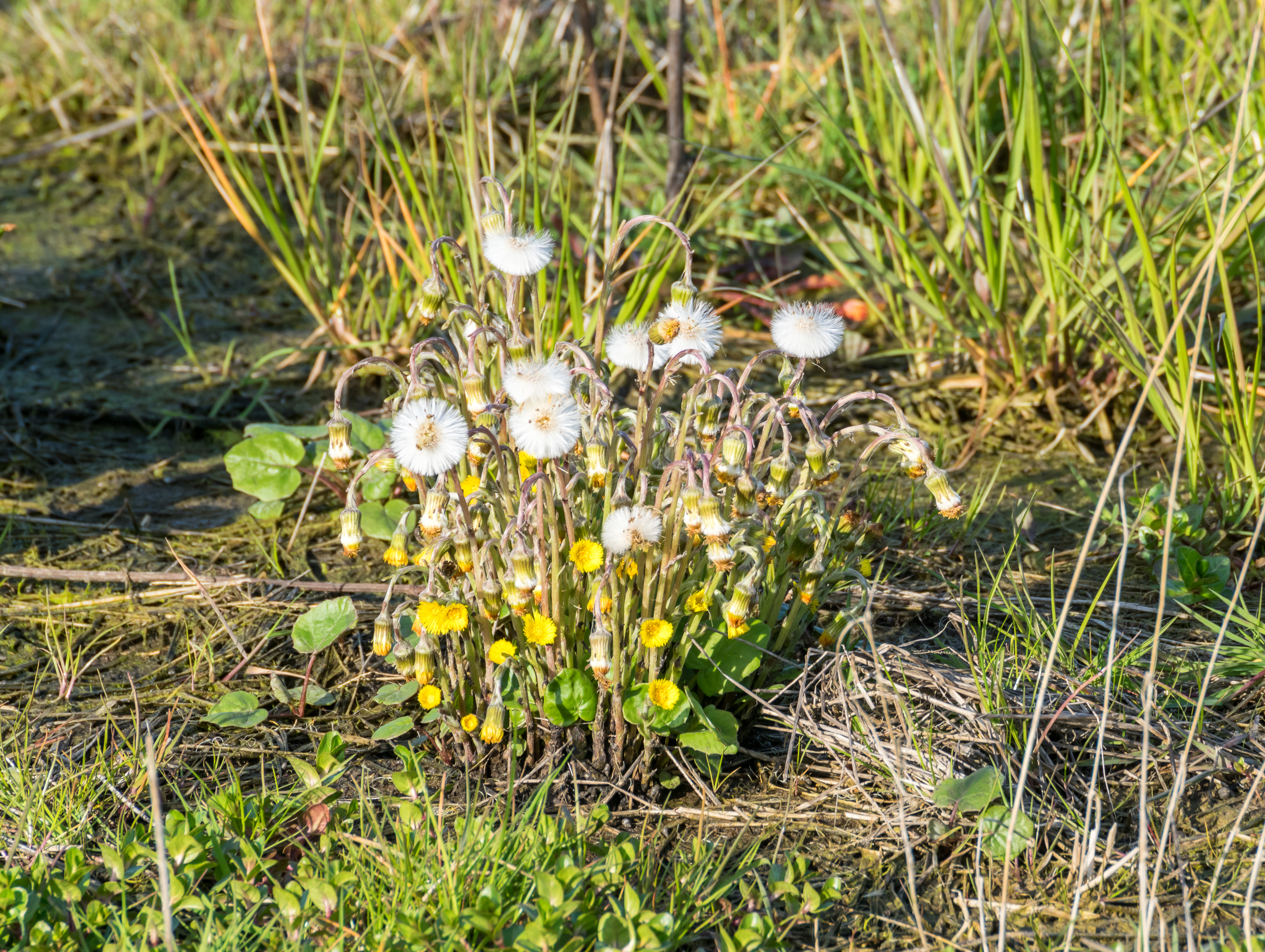 Huflattich im Regenrückhaltebecken in Horn-Bad Meinberg-Belle im LSG Egge-Gebiet und Lipper Bergland mit Bielefelder Osning, Paderborner Hochfläche und Hellwegbörden